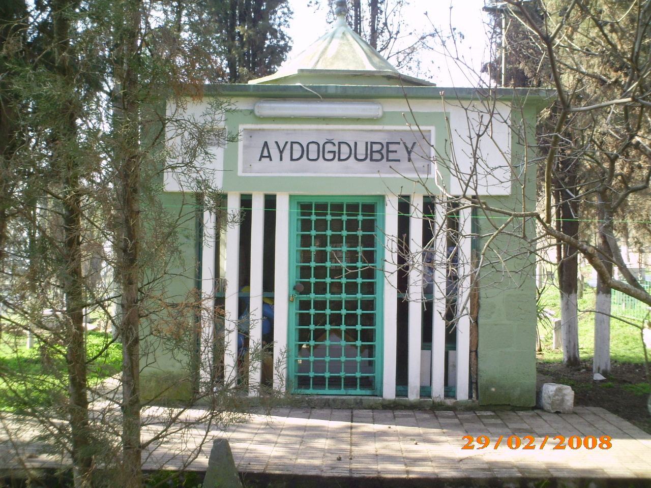 Aydoğdubey türbesi.